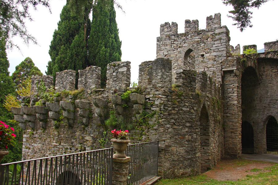 Resti delle fortificazioni del castello di Mattarella a Domodossola (VB)